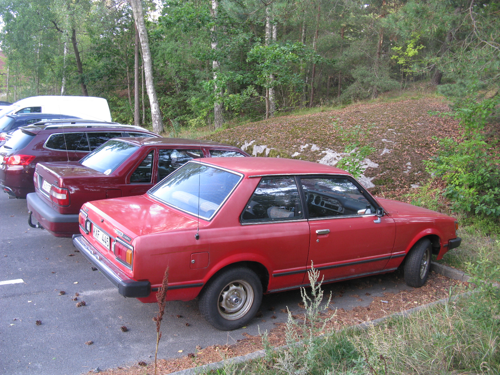 Toyota Carina